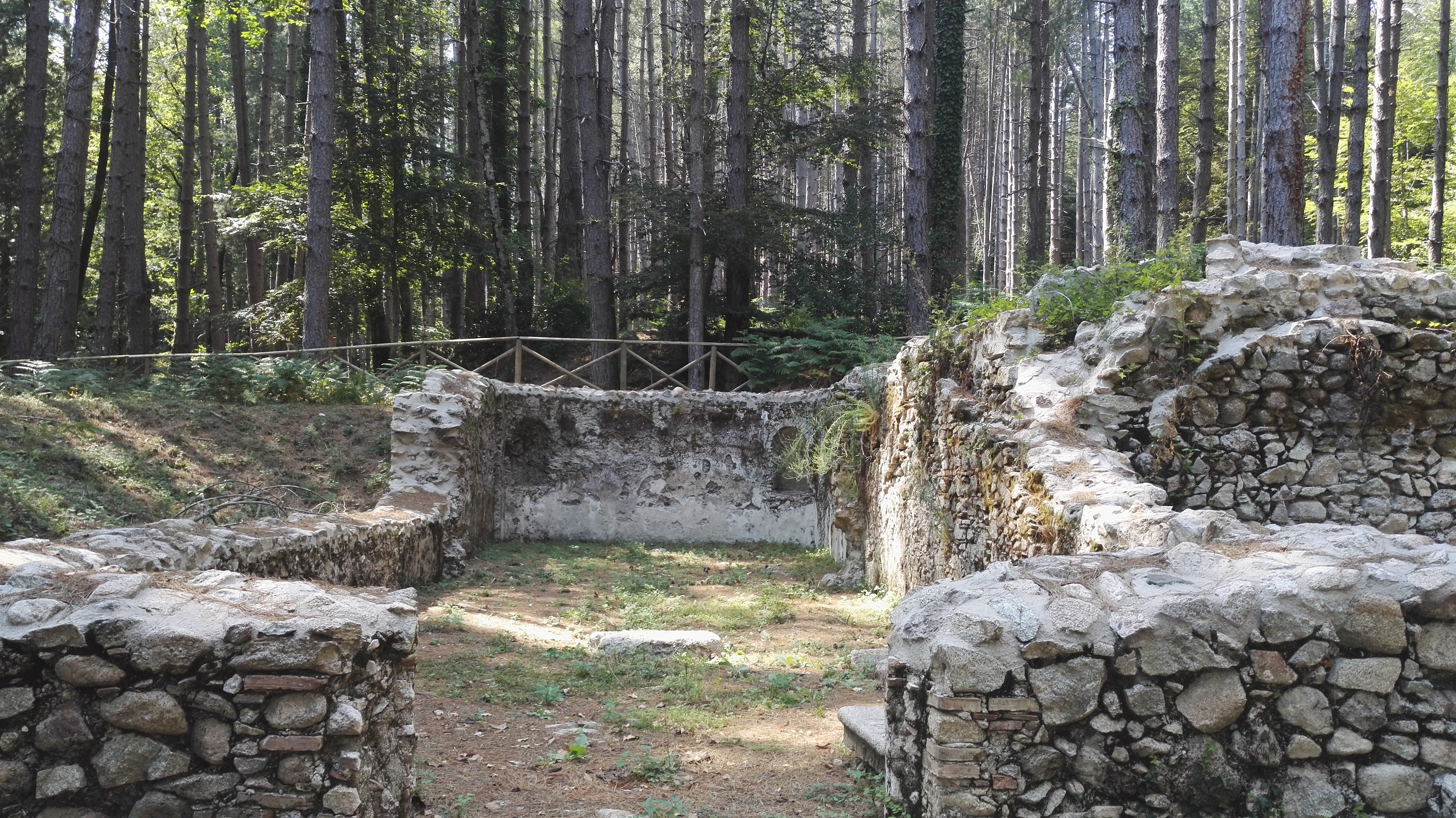 Parco siderurgico di Chiesa Vecchia (Ferdinandea)